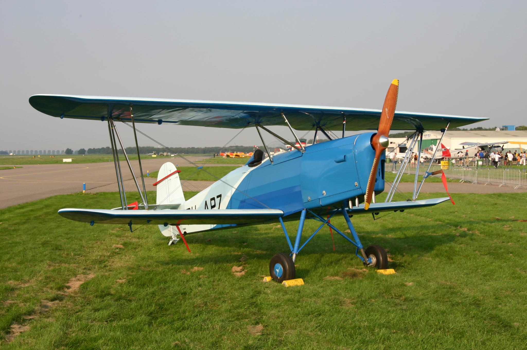 De Lambach HL II: GFDL; Upload door fotograaf